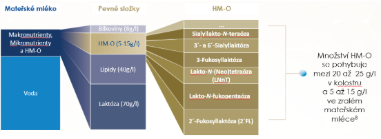 Zivkovic AM, German JB, Lebrilla CB, Mills DA. Human milk glycobiome and its impact on the infant gastrointestinal microbiota. PNAS 2011; Suppl(1), vol.108:4653-4658.